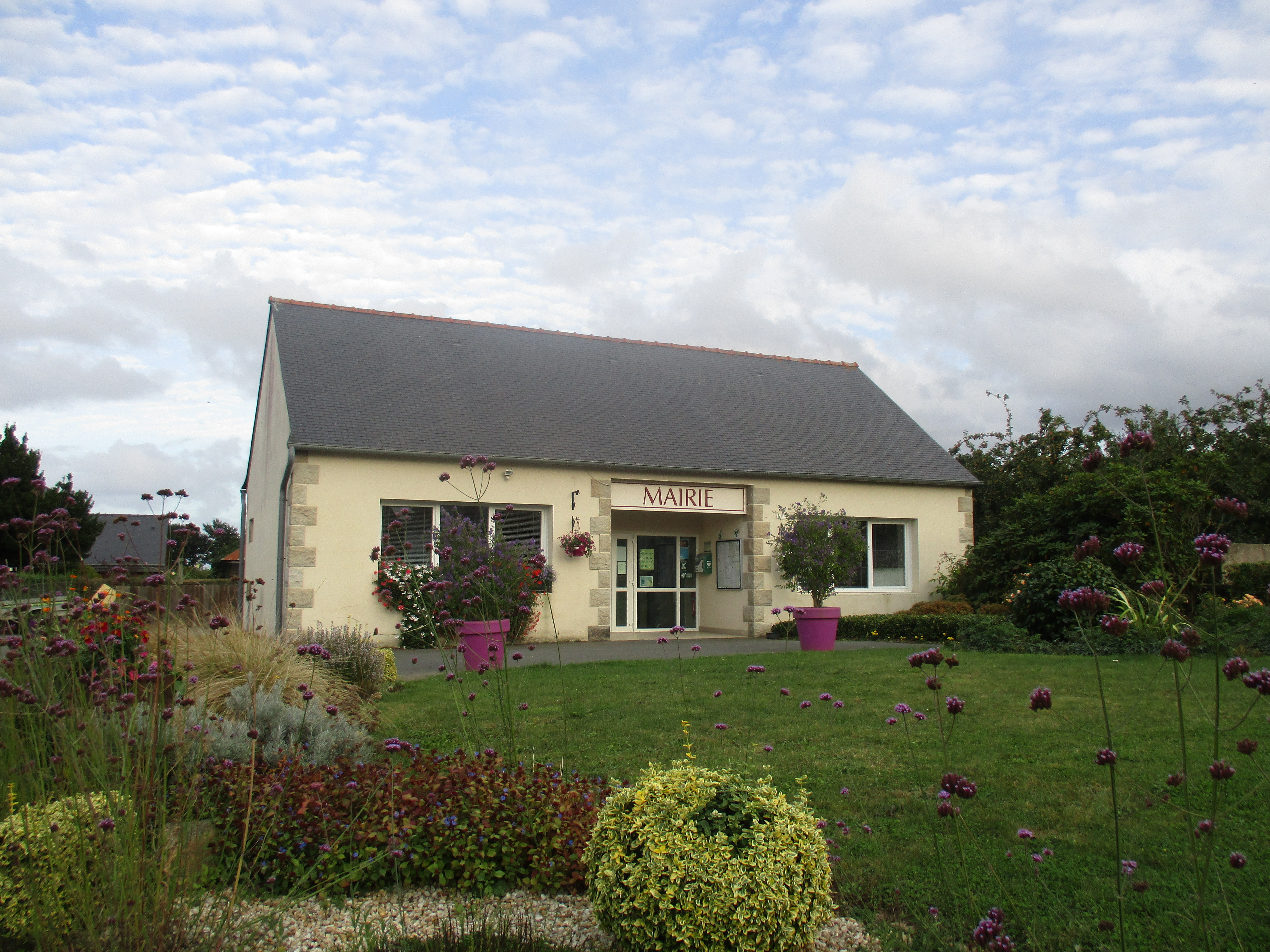 La mairie de Trégonneau